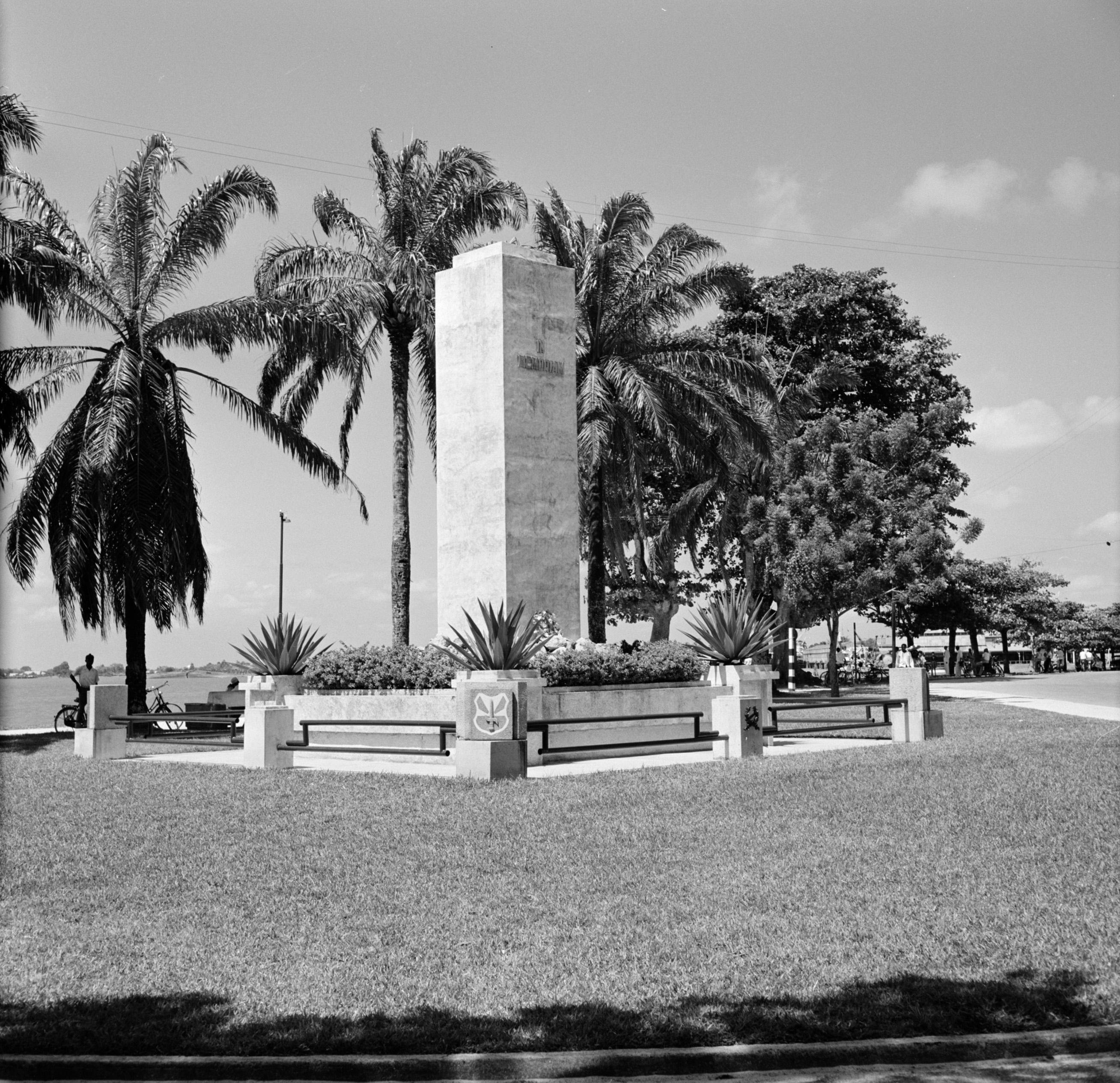 Collectie / Archief : Fotocollectie Van de Poll Reportage / Serie : Nederlandse Antillen en Suriname ten tijde van het koninklijk bezoek van koningin Juliana en prins Bernhard in 1955 Beschrijving : Het monument voor de gevallenen in Paramaribo Datum : 1 oktober 1955 Locatie : Paramaribo, Suriname Trefwoorden : monumenten Fotograaf : Poll, Willem van de Auteursrechthebbende : Nationaal Archief Materiaalsoort : Negatief (zwart/wit) Nummer archiefinventaris : bekijk toegang 2.24.14.02 Bestanddeelnummer : 252-2220